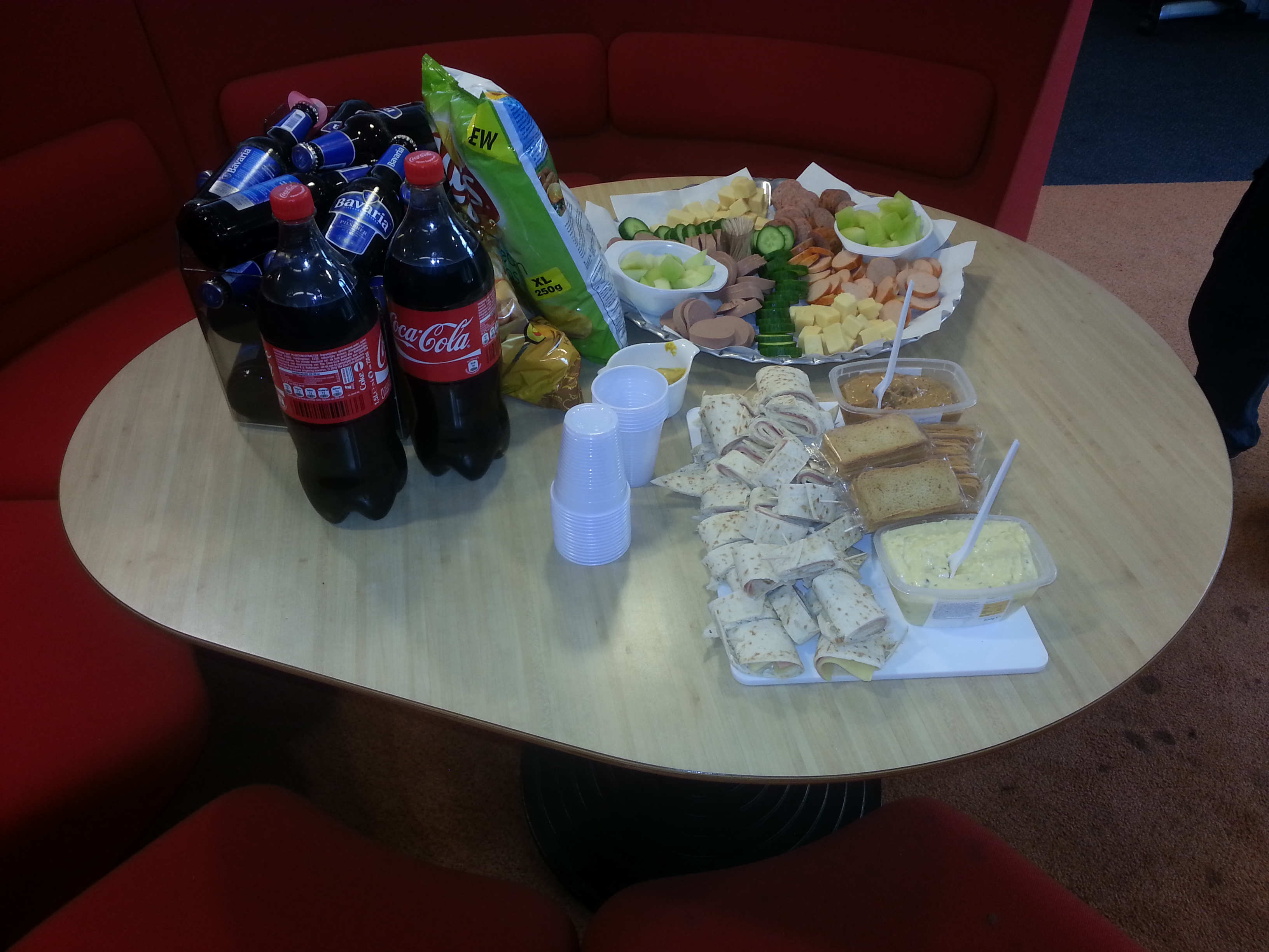 Vrijdagmiddagborrel